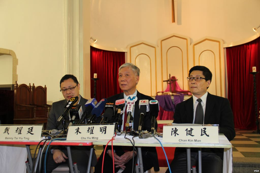 啟動“佔領中環”運動記者會